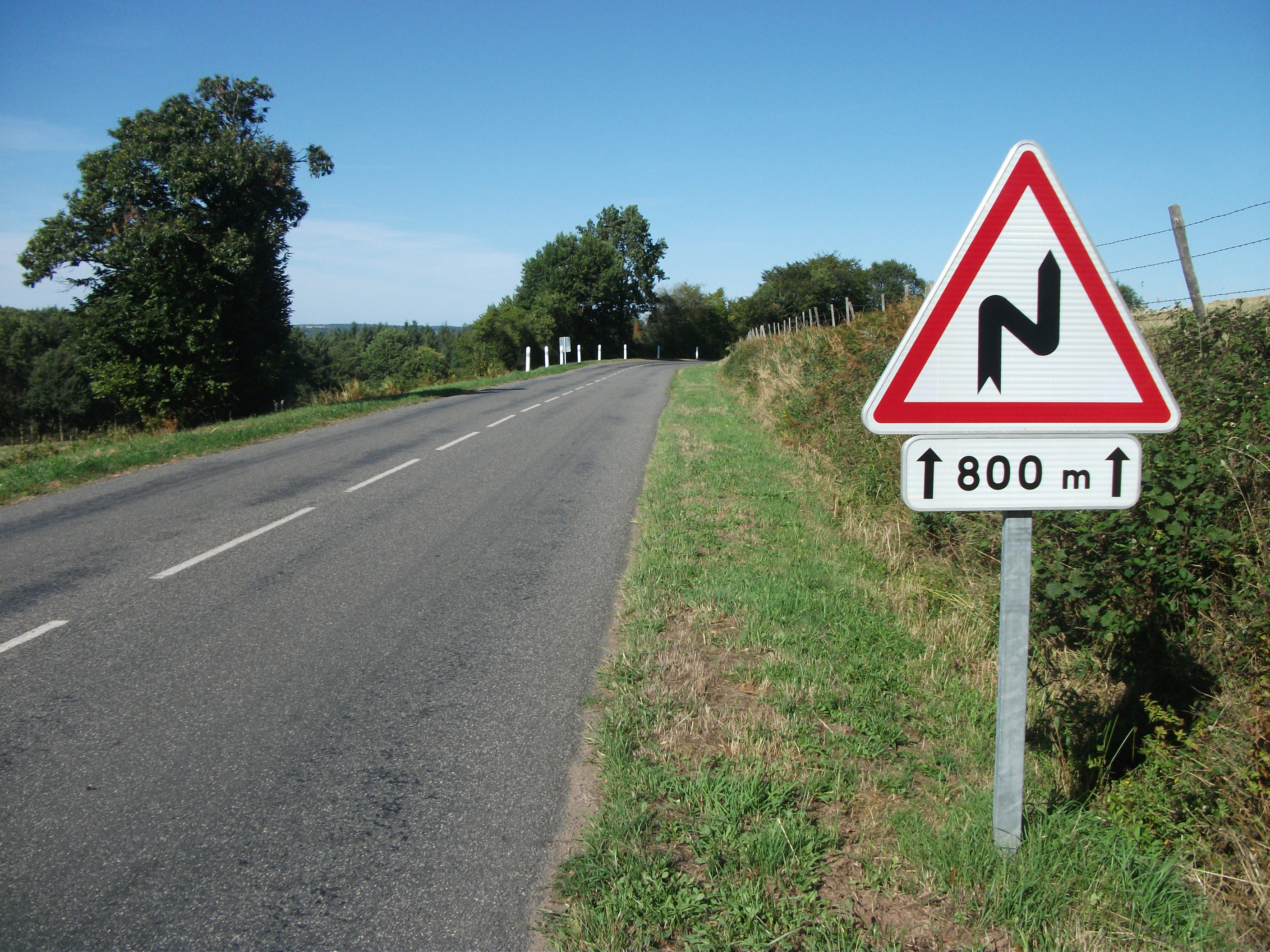 Signal A1c de succession de virages dont le premier est à droite, sur la D 906B, en direction de Bost. [8905]